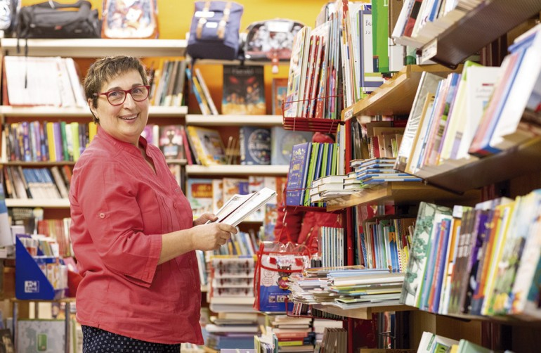 Martzela Abarzuza Fontellas liburu saltzailea